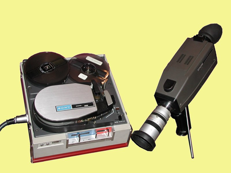 1970 Sony AV-3400 Portapack VTR and an AV Nerd in action